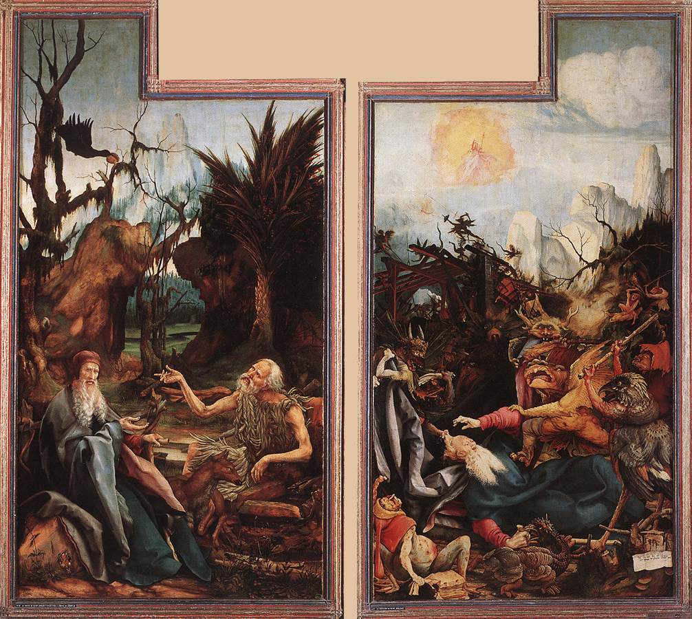 Ołtarz z Isenheim (widok pierwszy), ok. 1515, olej na desce, część środkowa: Ukrzyżowanie 269 x 307 cm, skrzydła boczne 269 x 141 cm, Musée d'Unterlinden, Colmar